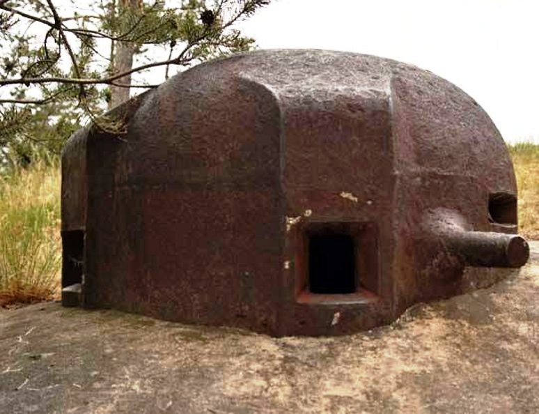 Cupola del caposaldo Col dei Bovi